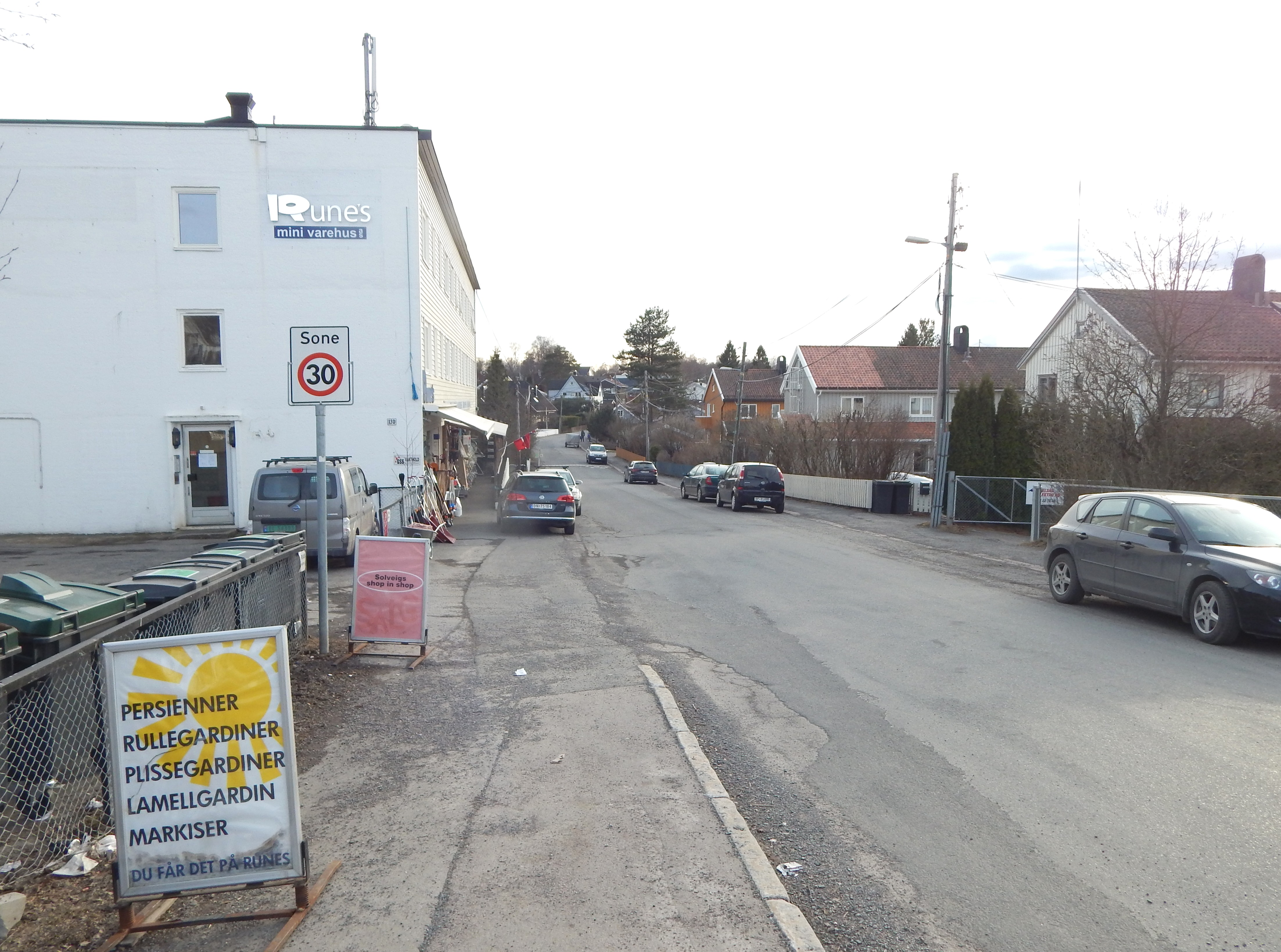 Kapellveien nær Kjelsåsveien